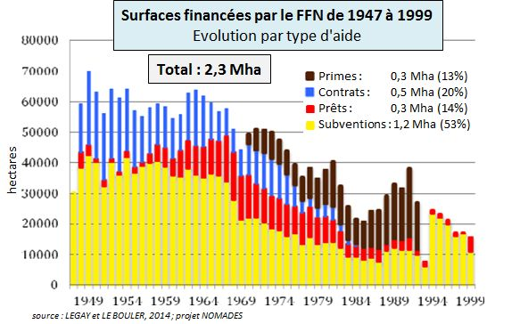 d'après LEGAY et LE BOULER, 2014 ; Eléments d'histoire et de répartition géographique des essences forestières introduites en France métropolitaine ; projet NOMADES ; fascicule 1